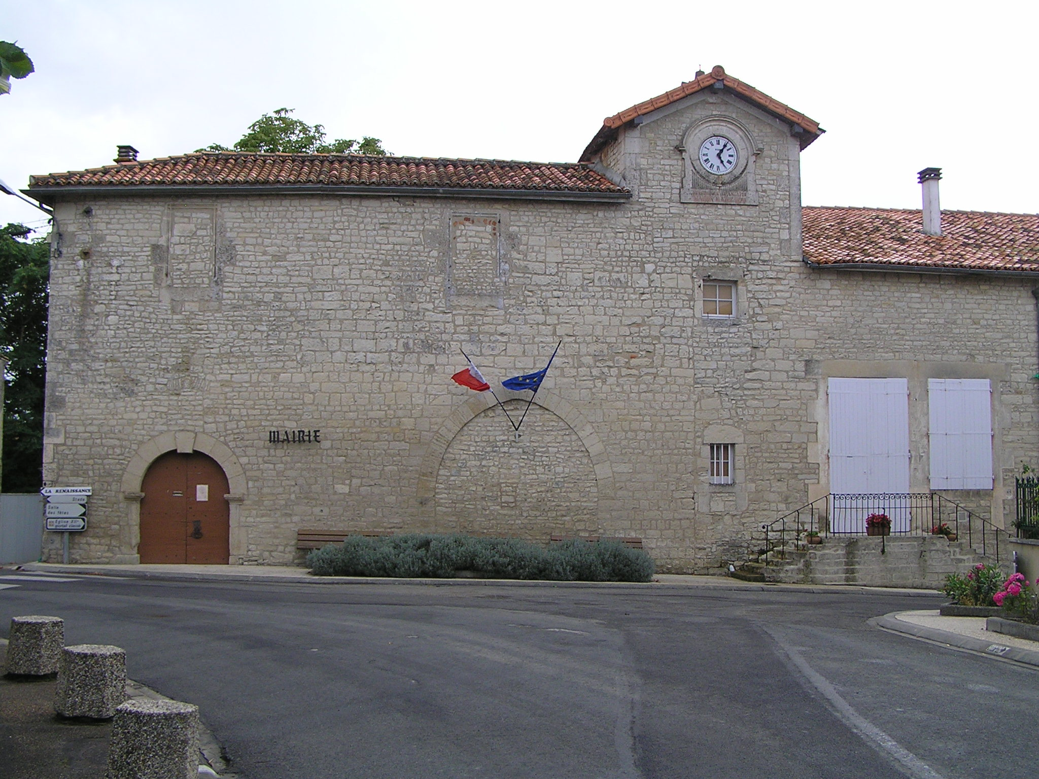 mairie de Villognon